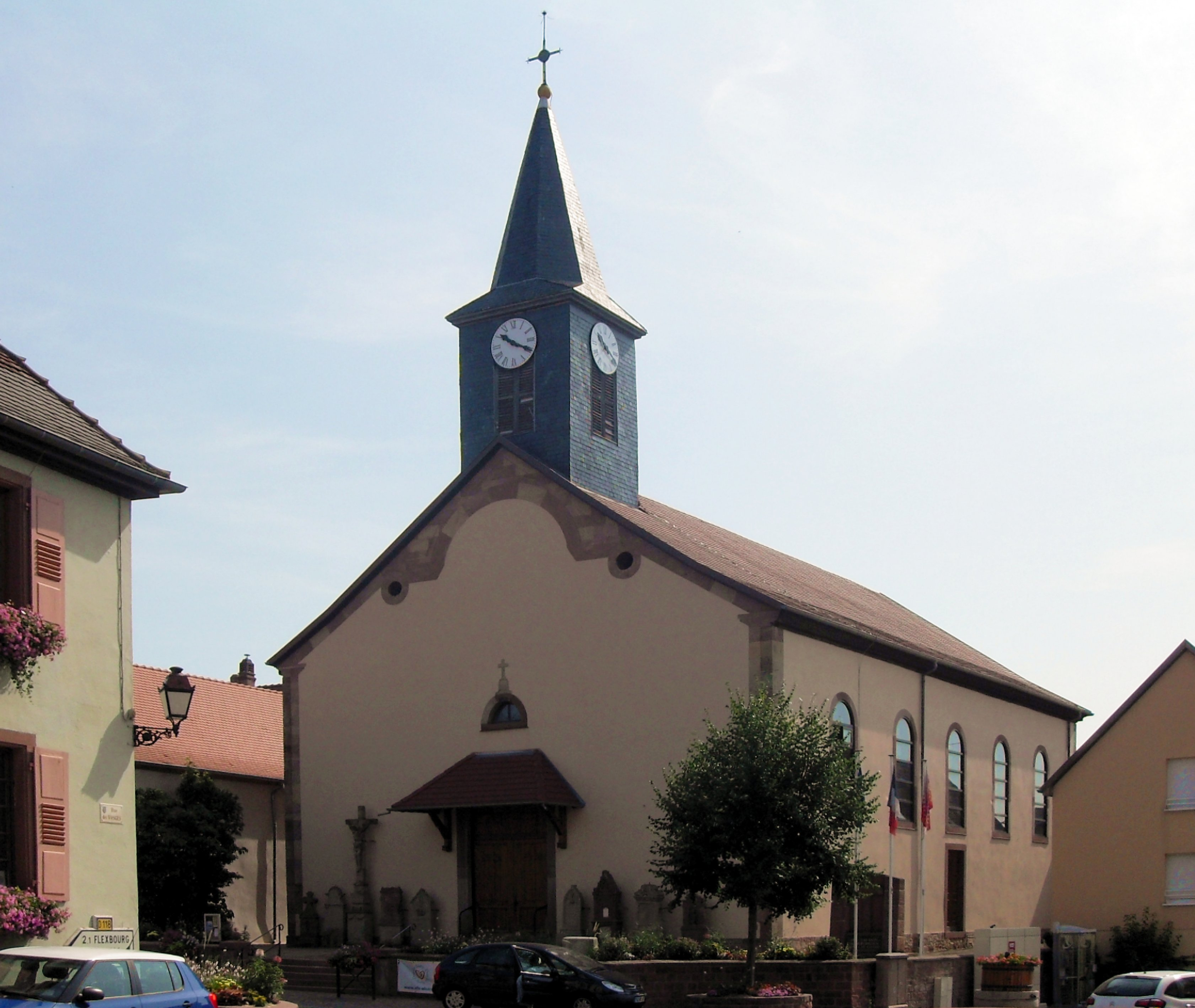 L'église Saint-Laurent de Bergbieten